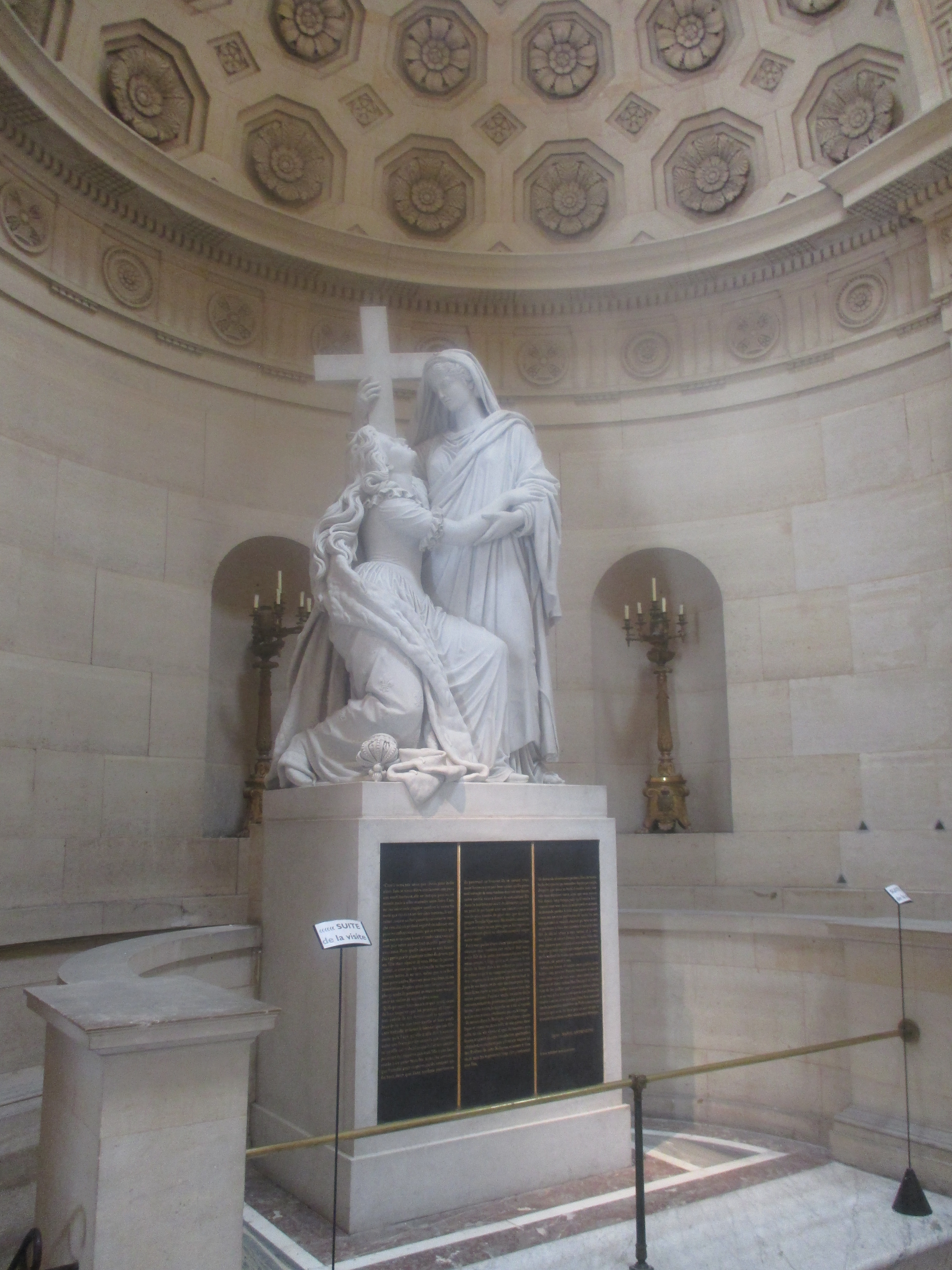 Marie-Antoinette soutenue par la religion (Cortot), chapelle expiatoire de Paris.